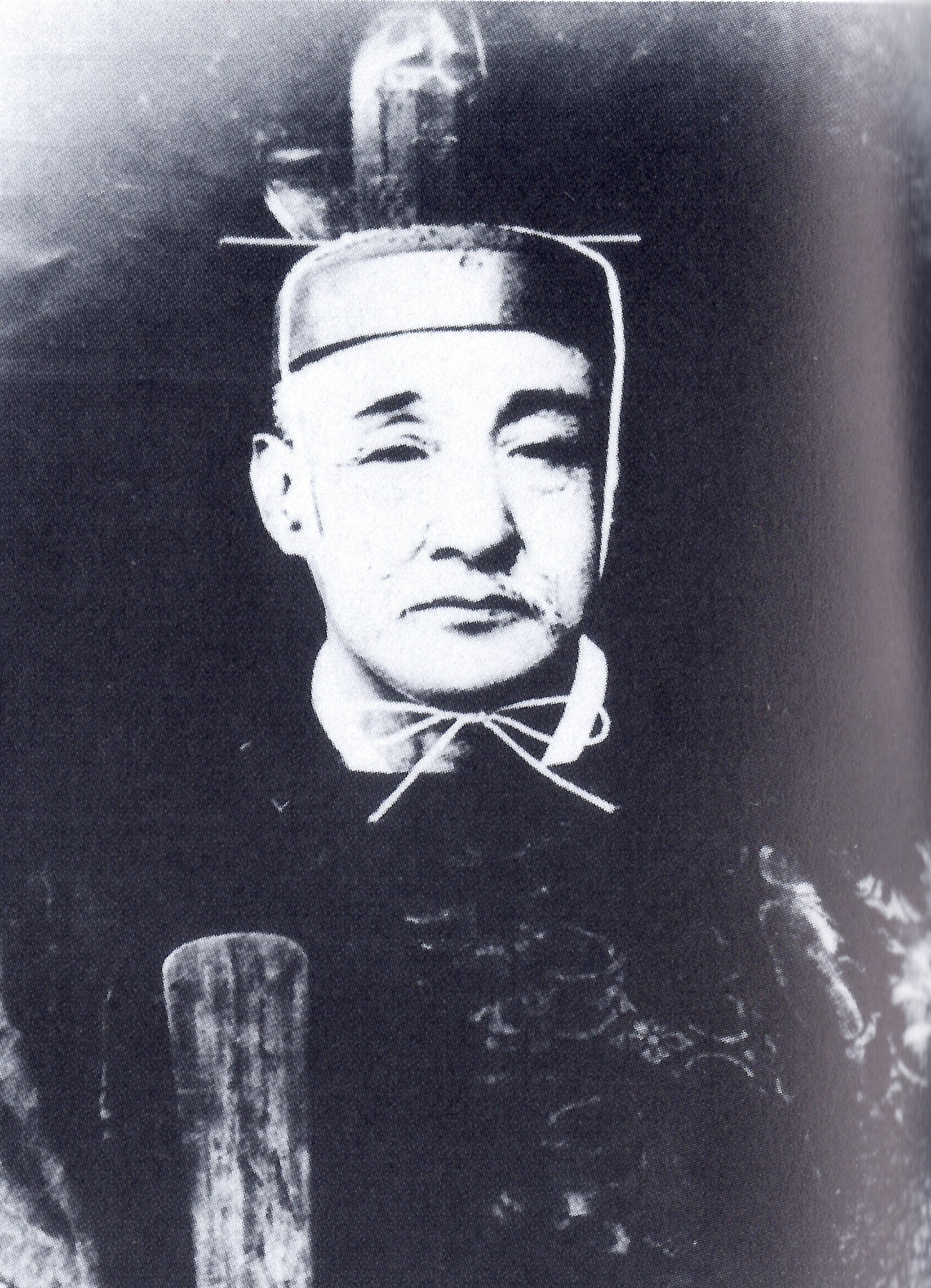 中山信徴の肖像。